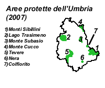 Zaštićeni parkovi u Umbriji.